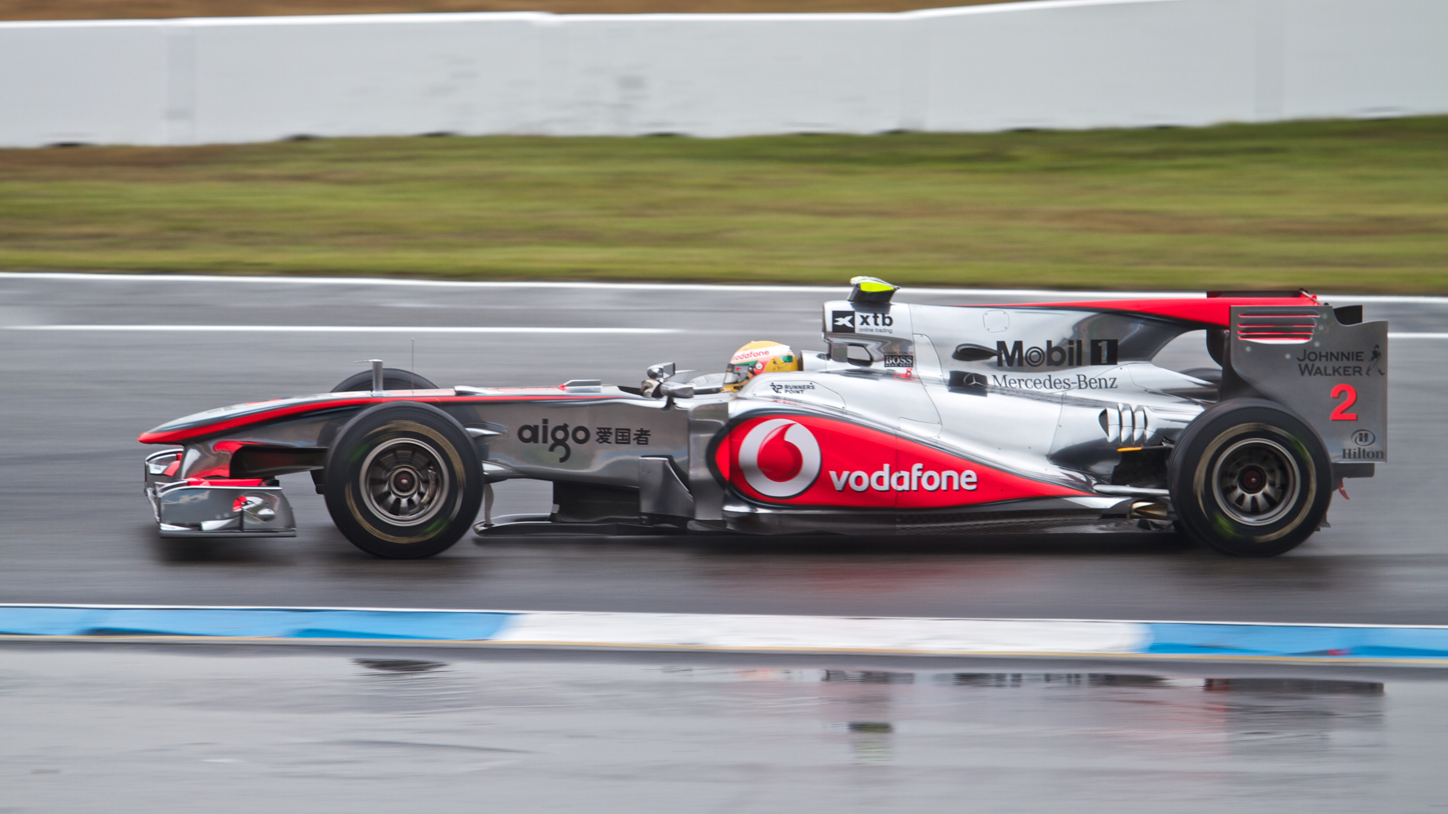 Lewis Hamilton à Hockenheim en 2010